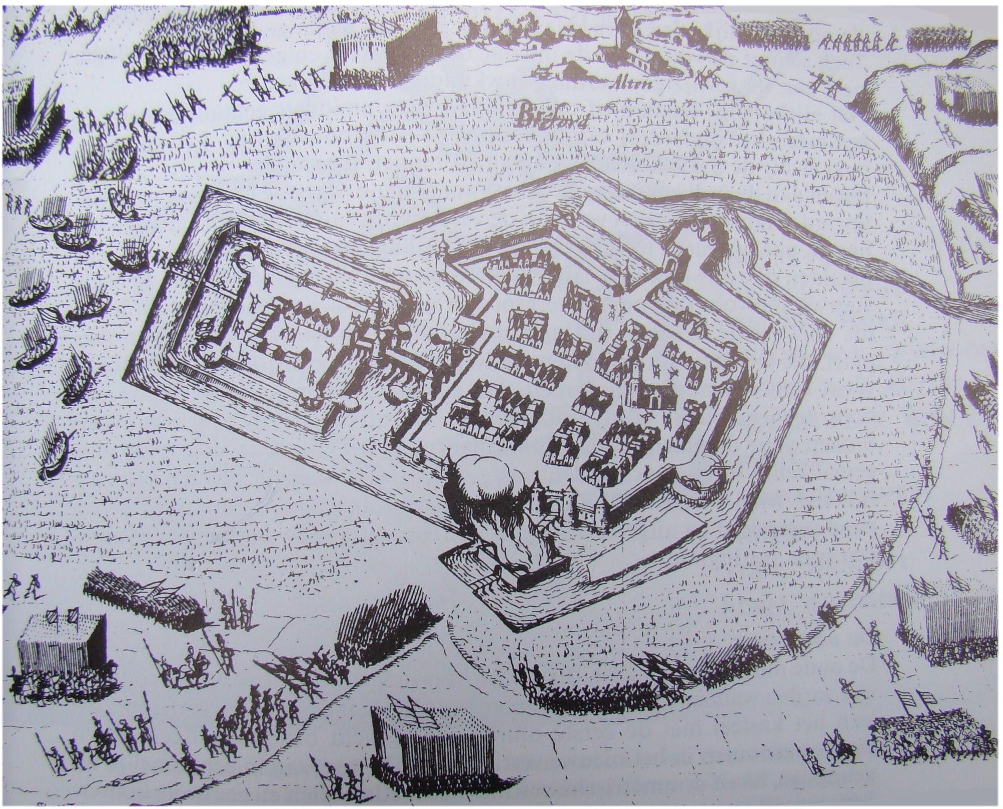 Bredevoort overompeld, 1606